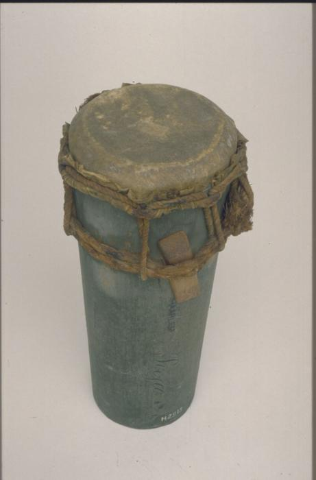 Model. Gaspar van Breugel maakte in 1824 op zijn plantage Clifford Kocqshoven een feest van de slaven mee, waarbij in eerste instantie eer werd bewezen aan watramama, -de geest van het waterpantheon- en dat overging in een wintiritueel. Er werd gedurende drie dagen en nachten muziek werd gemaakt en gedanst. De blanke meesters hebben het begin van het feest gadegeslagen. Van Breugel raakte er gefascineerd door, zodat hij na afloop een miniatuursetje van de muziekinstrumenten liet maken. Twee van die miniatuurtrommen zijn in de collectie van het Tropenmuseum (H-2913 & H-2914). Hij liet zich ook de ritmes voordoen, om ze later in Nederland aan zijn vrienden ten gehore te kunnen brengen. Bij dezelfde gelegenheid liet hij zes poppen maken die de danseressen voorstellen (vier ervan in collectie Tropenmuseum Inv.nr. A-6195a/d). Thuis in Haarlem vond hij het dus aardig '… om met mijne vrienden in Holland eens een negerspel in forma te kunnen vertoonen'. Zijn vrienden raakten kennelijk niet in de baan van die opvoeringen; in tegendeel de heren verlieten 'met een zenuwachtig geschatter' de kamer en de vrouwen volgden met 'zenuwachtig gehuil'. Volgens Susan Legêne moet de discrepantie tussen de fascinatie van het gadegeslagen ritueel en de afwijzingen door zijn vrienden thuis spanningen op hebben geroepen in Van Breugel. Legêne vermoedt dat de latere ijver van Van Breugel om de slaven tot het christendom te bekeren een poging was, om 'on speaking terms' hiermee te komen. (Bron: Susan Legêne, De bagage van Blomhoff en Van Breugel, Amsterdam 1998, p.258-259. De aangehaalde citaten van Van Breugel zijn hieruit overgenomen. Tekst: LM, 14 april 2009). . Model van een enkelvellige conische trom Undetermined language : Poeja